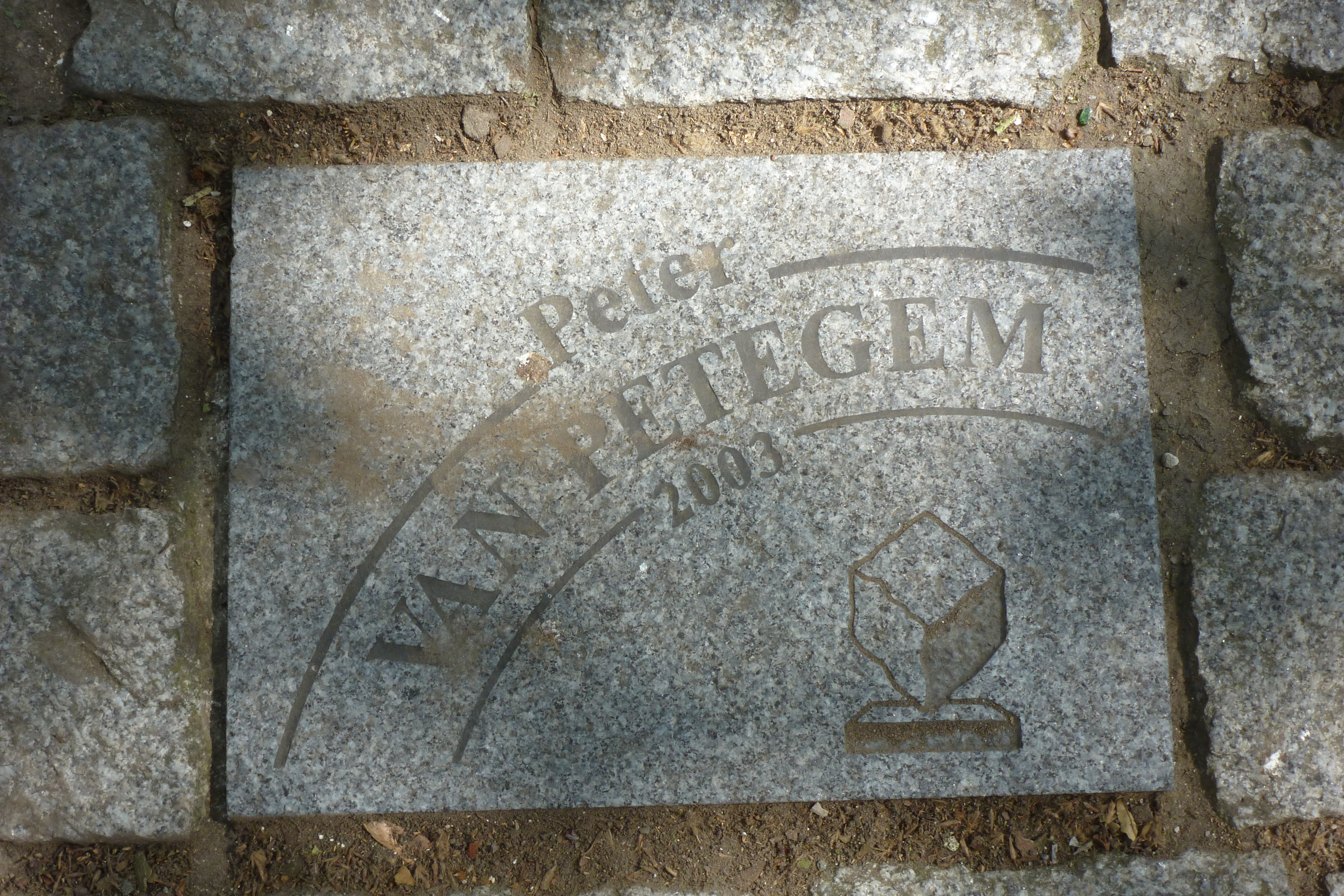 Pflasterstein für Peter Van Petegem auf der Allée Charles Crupelandt in Roubaix